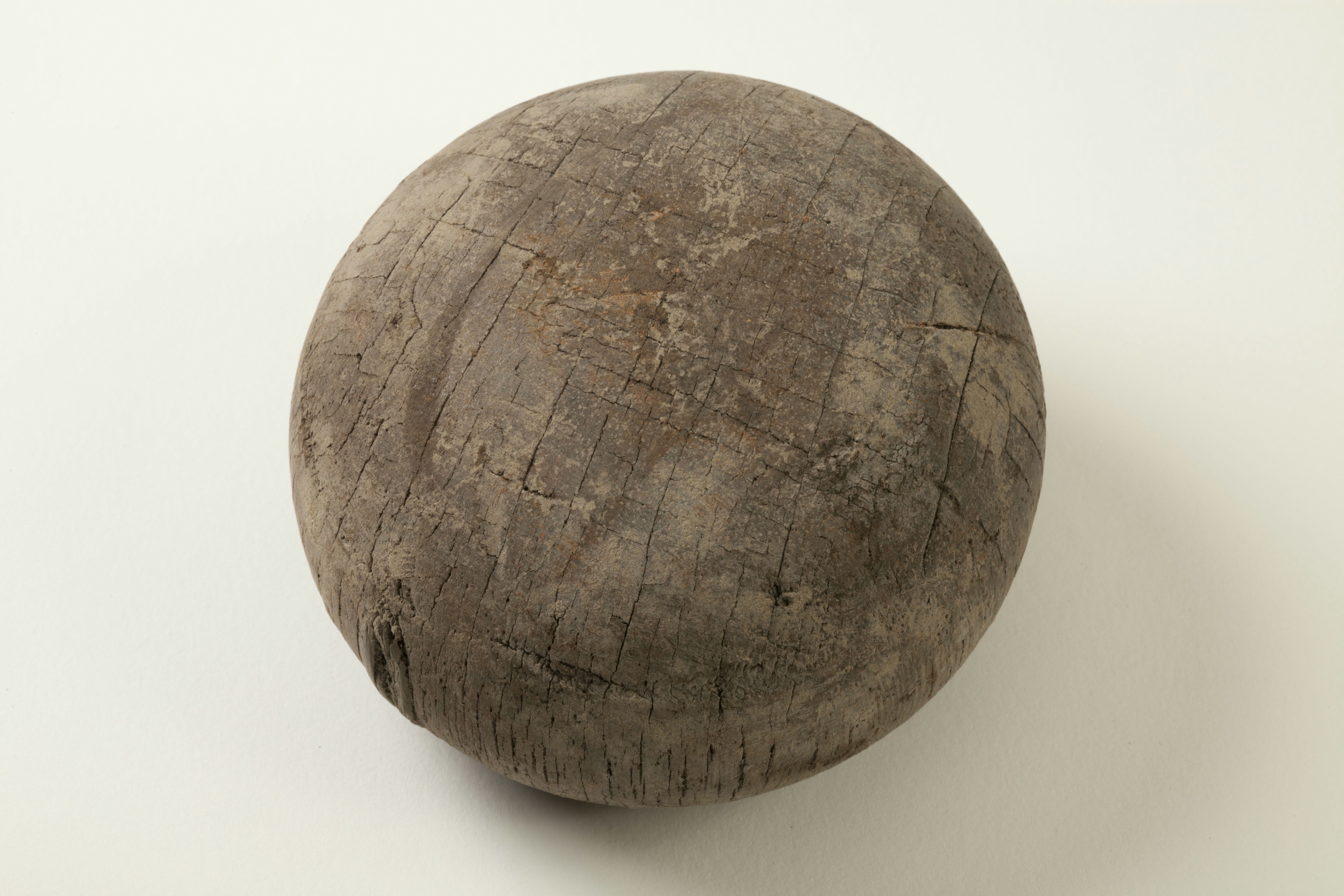 houten kloot Objectnummer: [MA]Z1952-II266Materiaal: hout